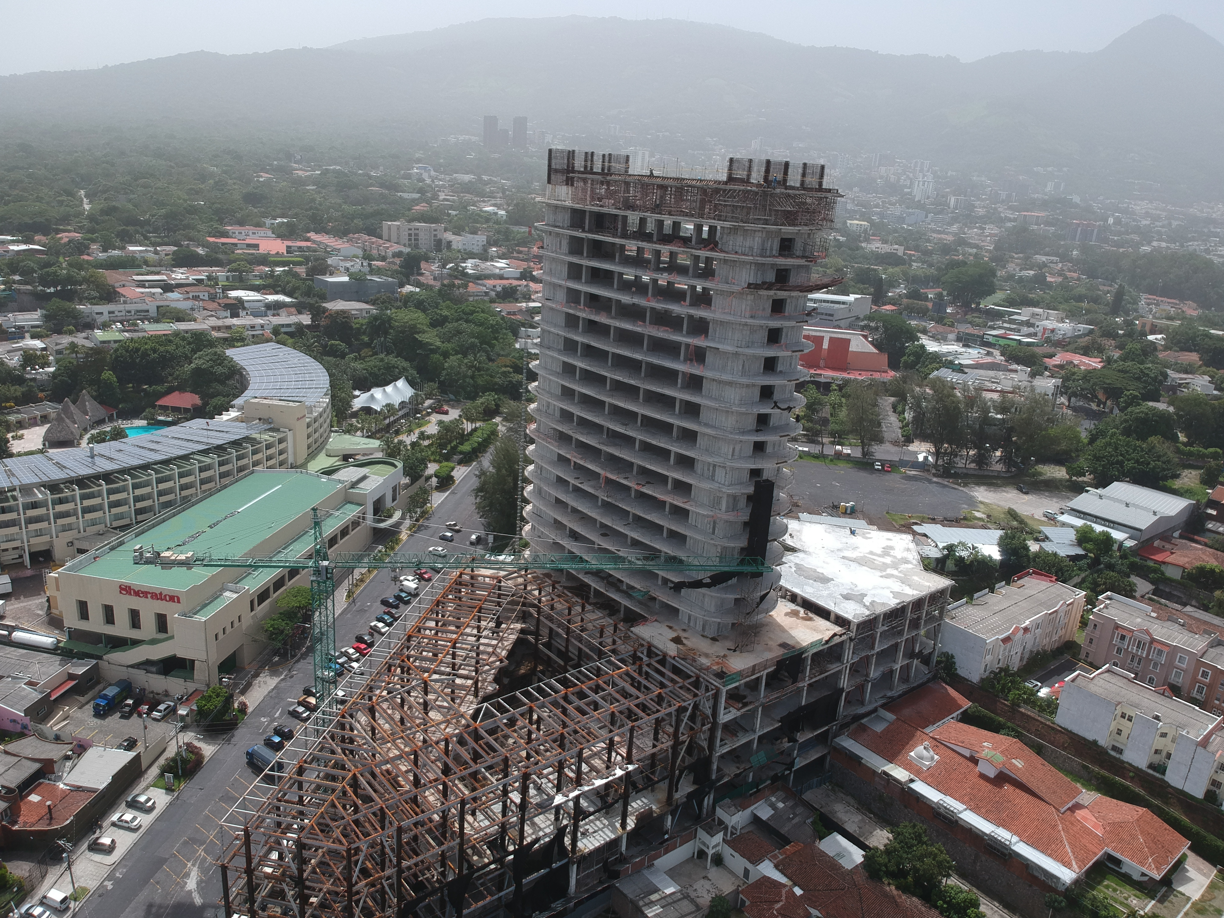 Torre presidente El Salvador